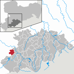 Schneeberg im Erzgebirgskreis, Sachsen